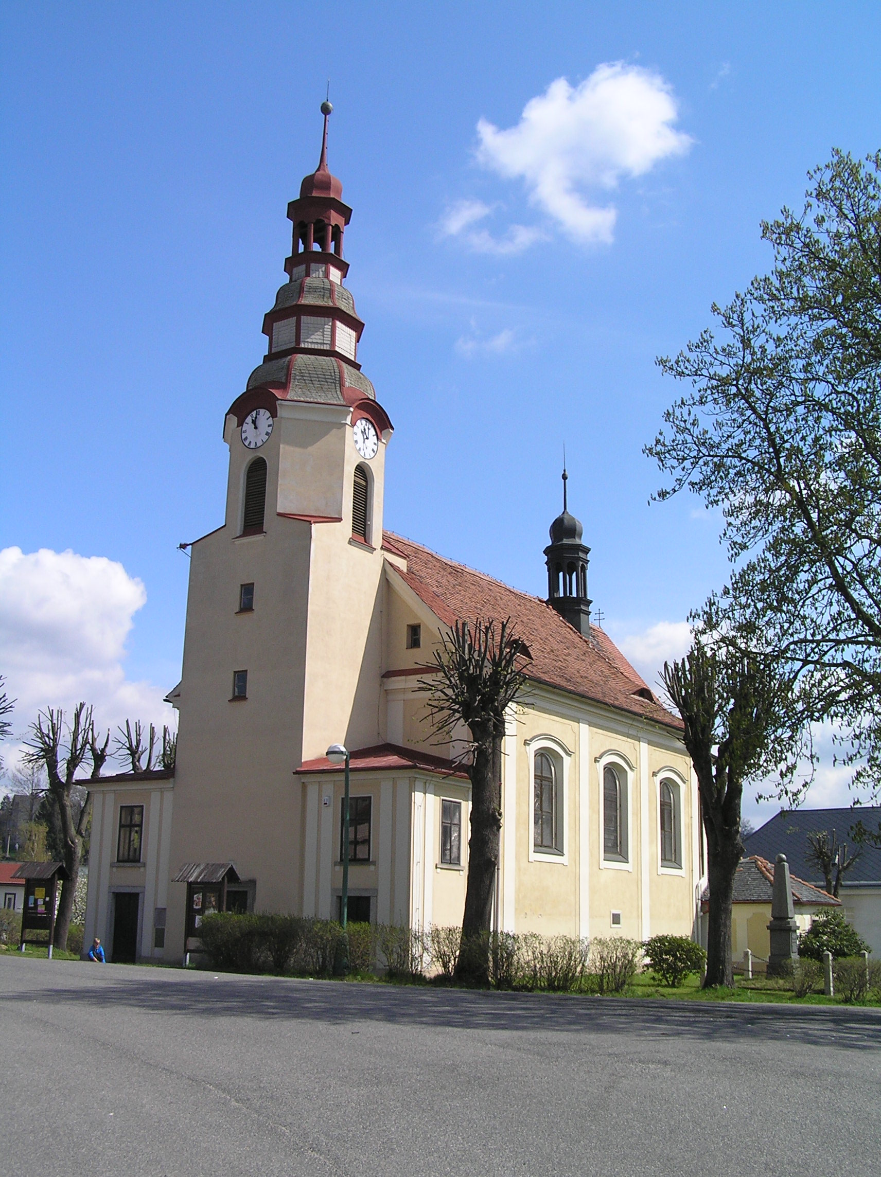 Kostel svaté Kateřiny, Stráž nad Nisou.